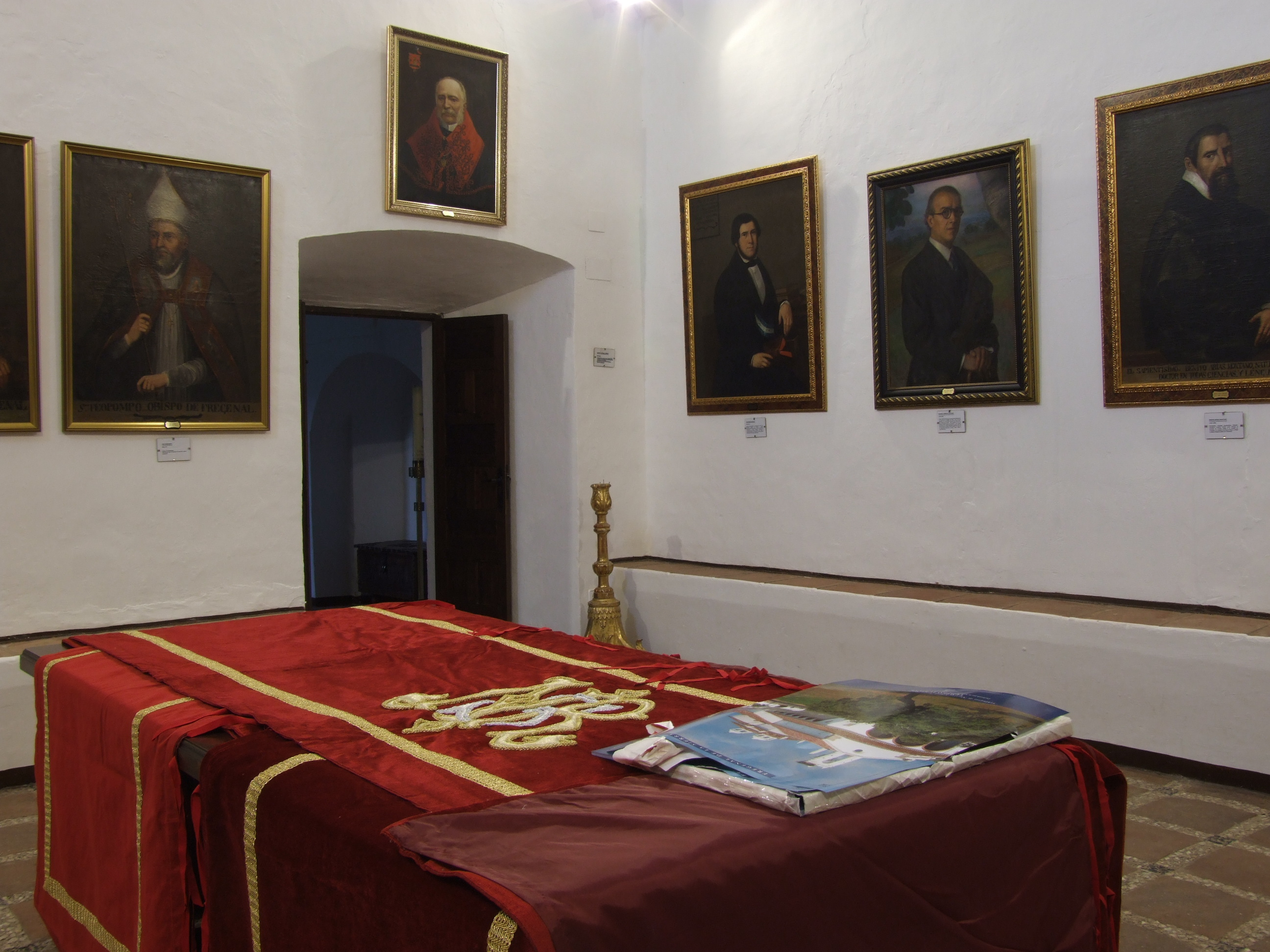 SALON HIJOS ILUSTRES